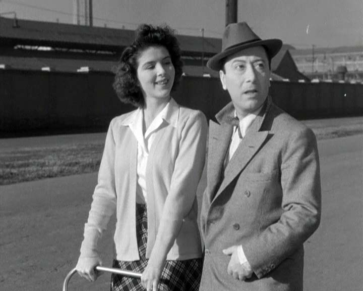 Screenshot del film L'eroe della strada, regia di Carlo Borghesio, 1948